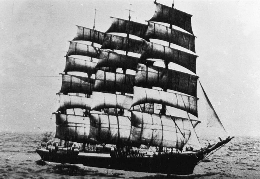 The German four-masted barque ‚Priwall‘.